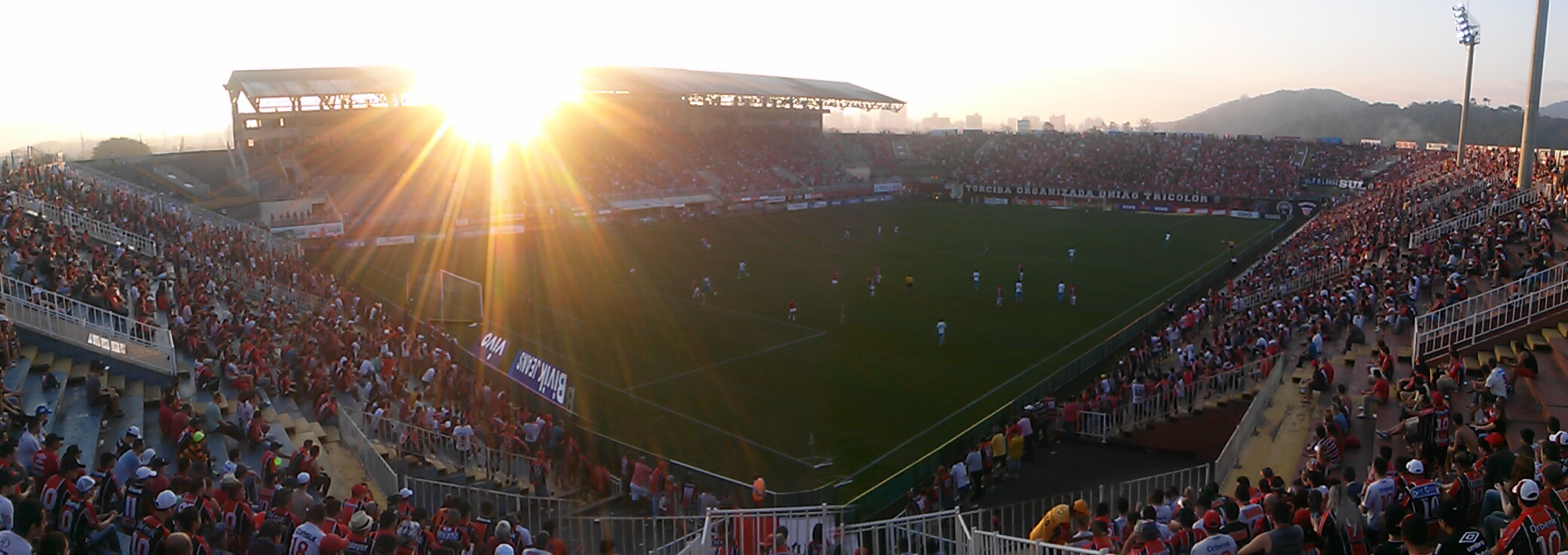 Joinville x Avaí pela 16 rodada do Campeonato Brasileiro (02/08/2015 - vitória do Joinville por 2 x 0)